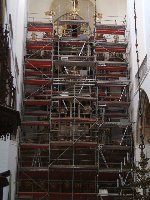 Die Stellwagen-Orgel in der Stralsunder Marienkirche während der Sanierung, eingerüstet